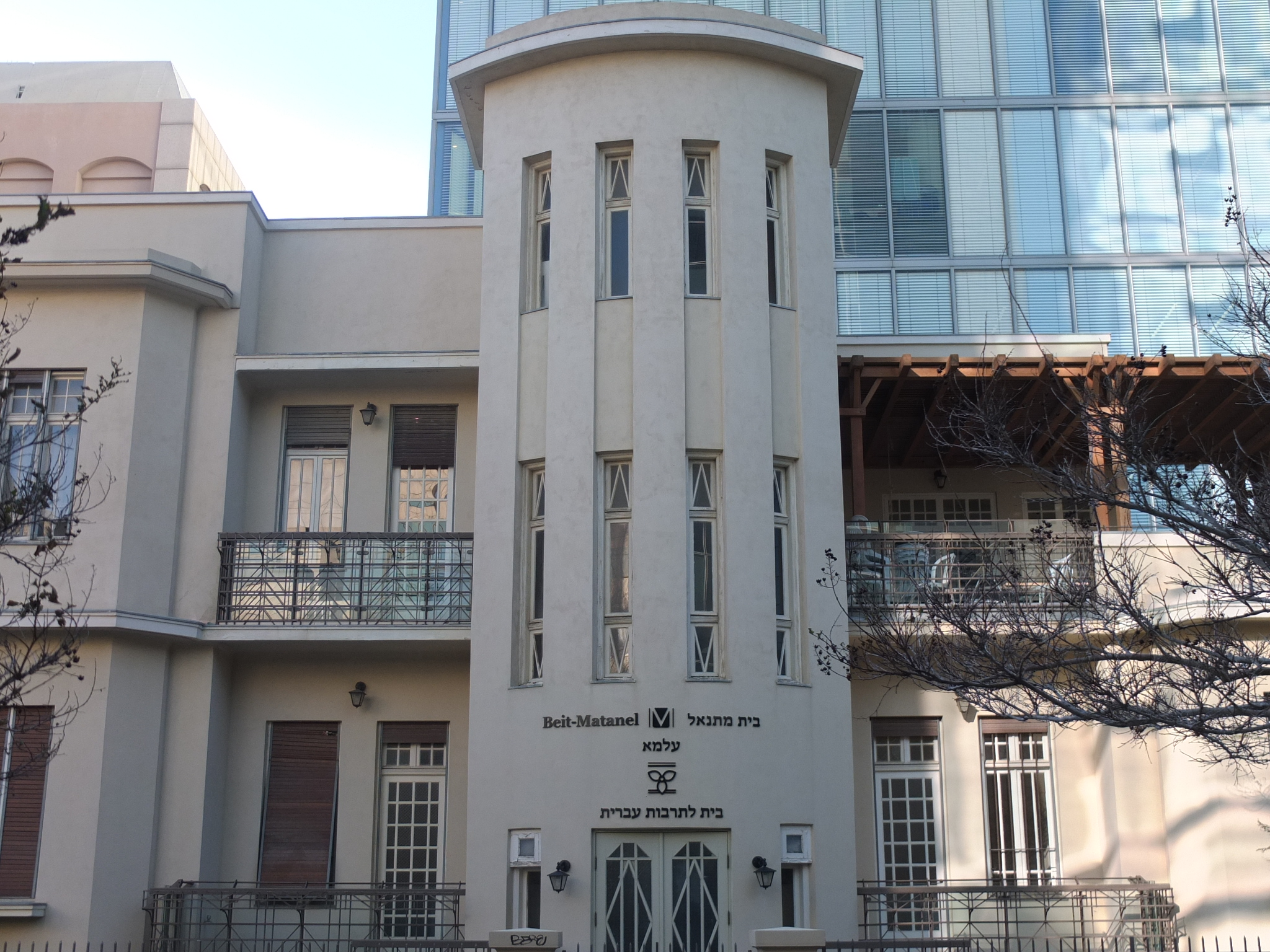 בית עלמא - בית לתרבות עברית ברח' שד"ל 6, תל-אביב